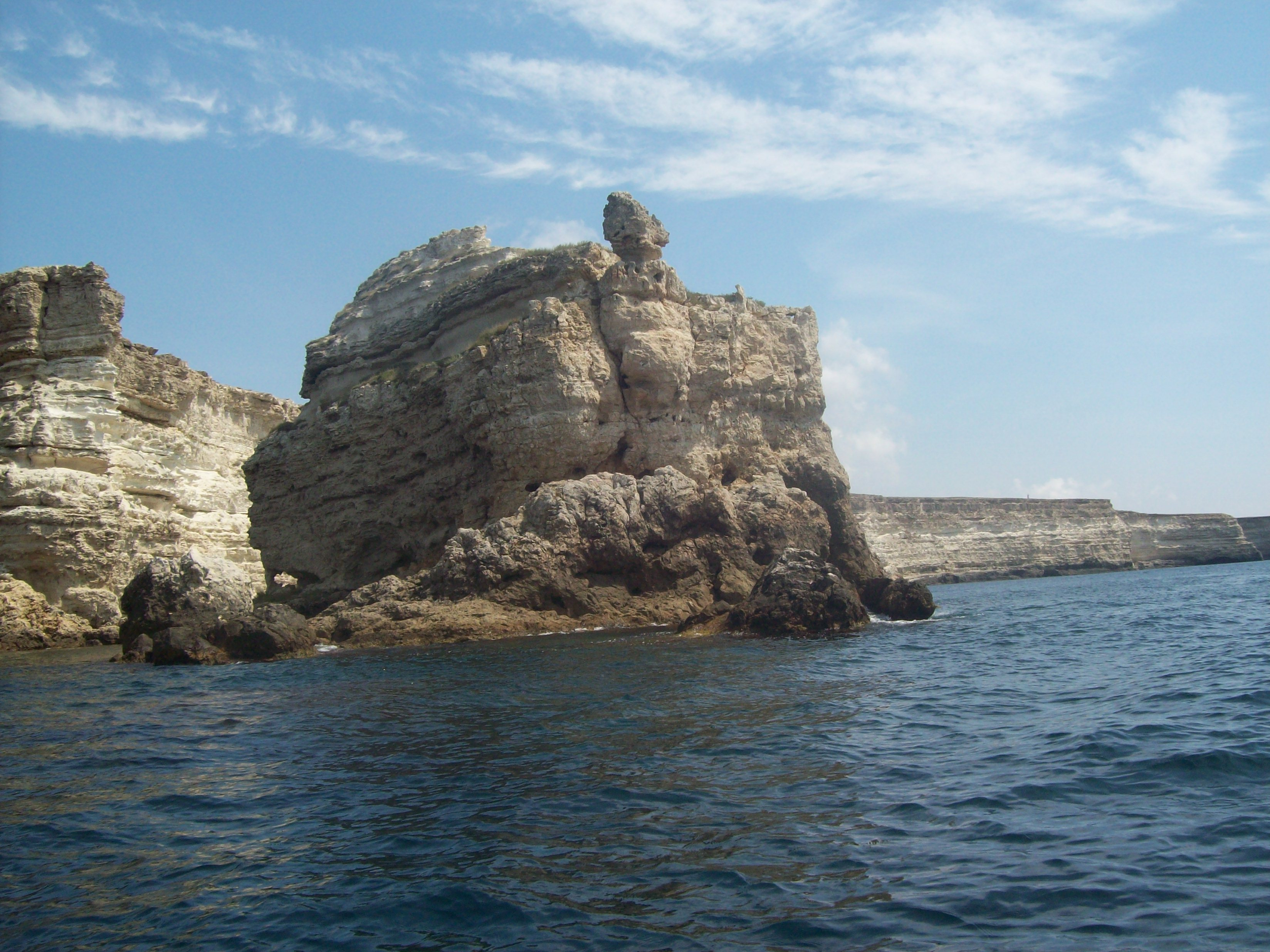 Знімок з катера, літо 2013